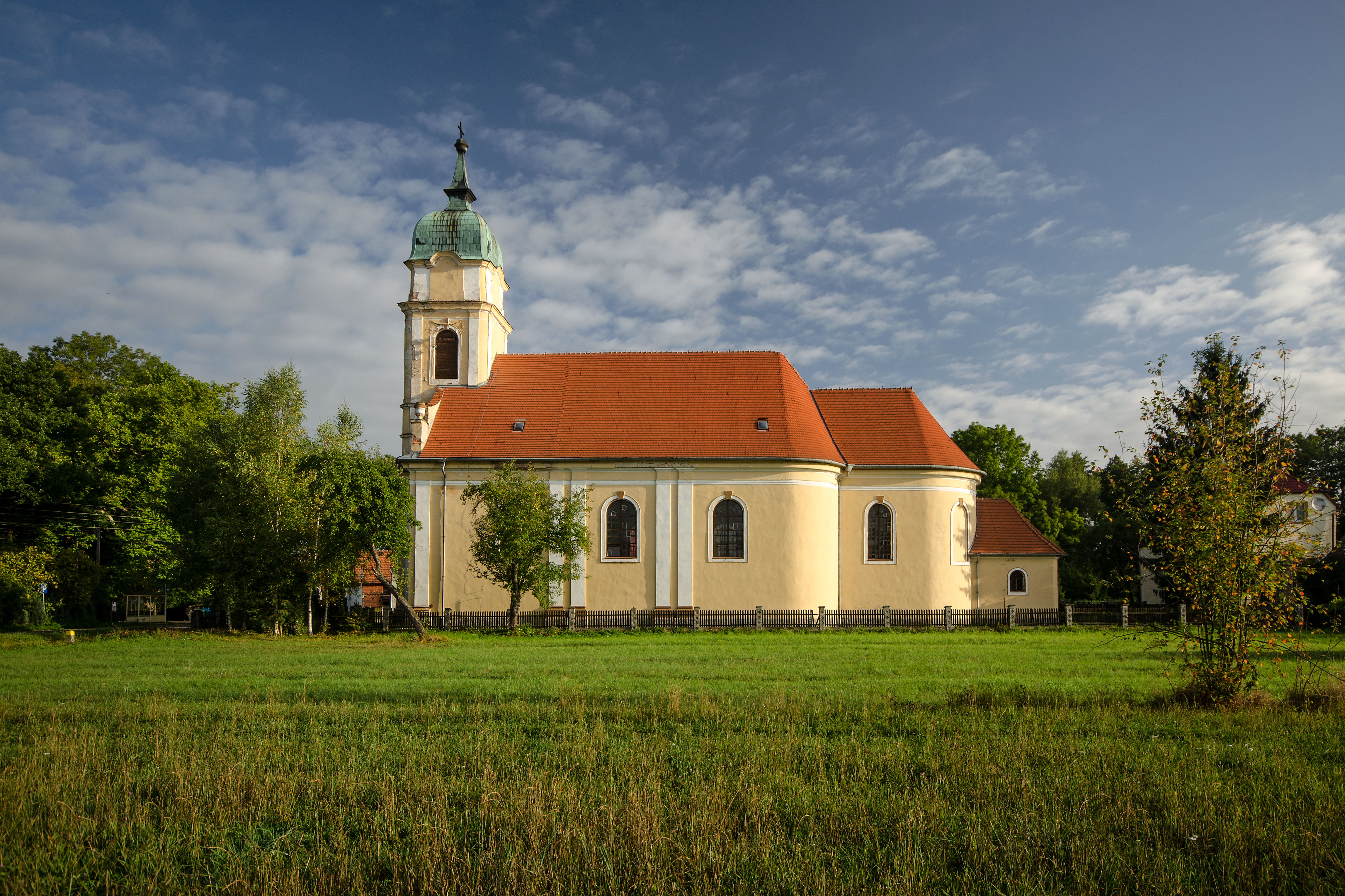 Zimna Woda, kościół par. p.w. Św. Trójcy, 1794-1797